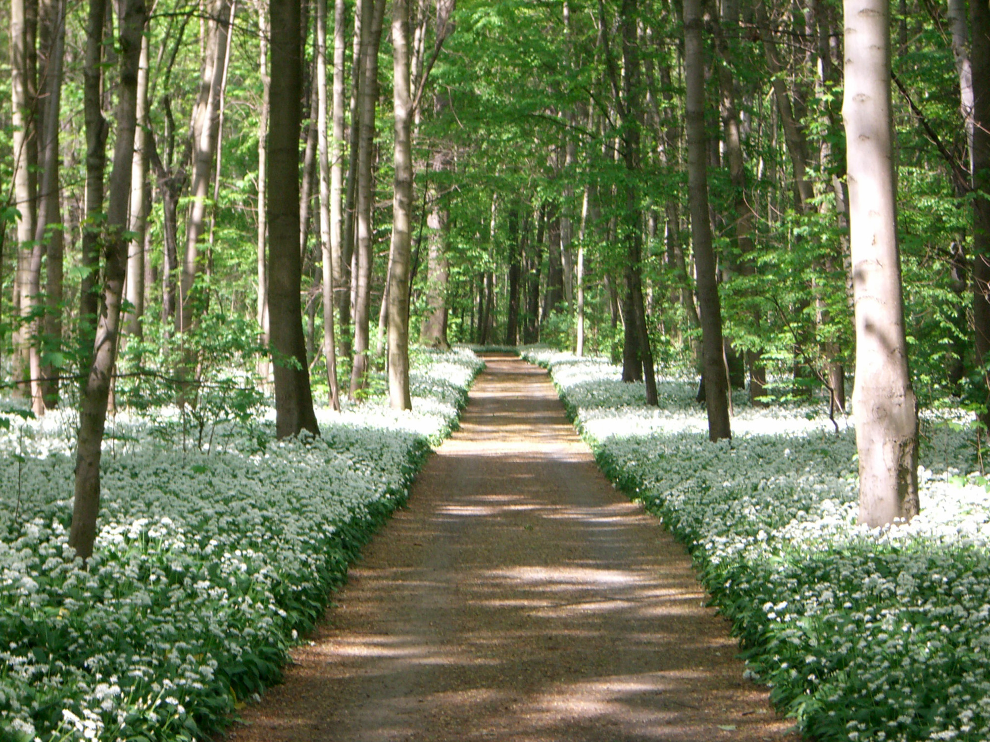 Bärlauchblüte im Connewitzer Holz